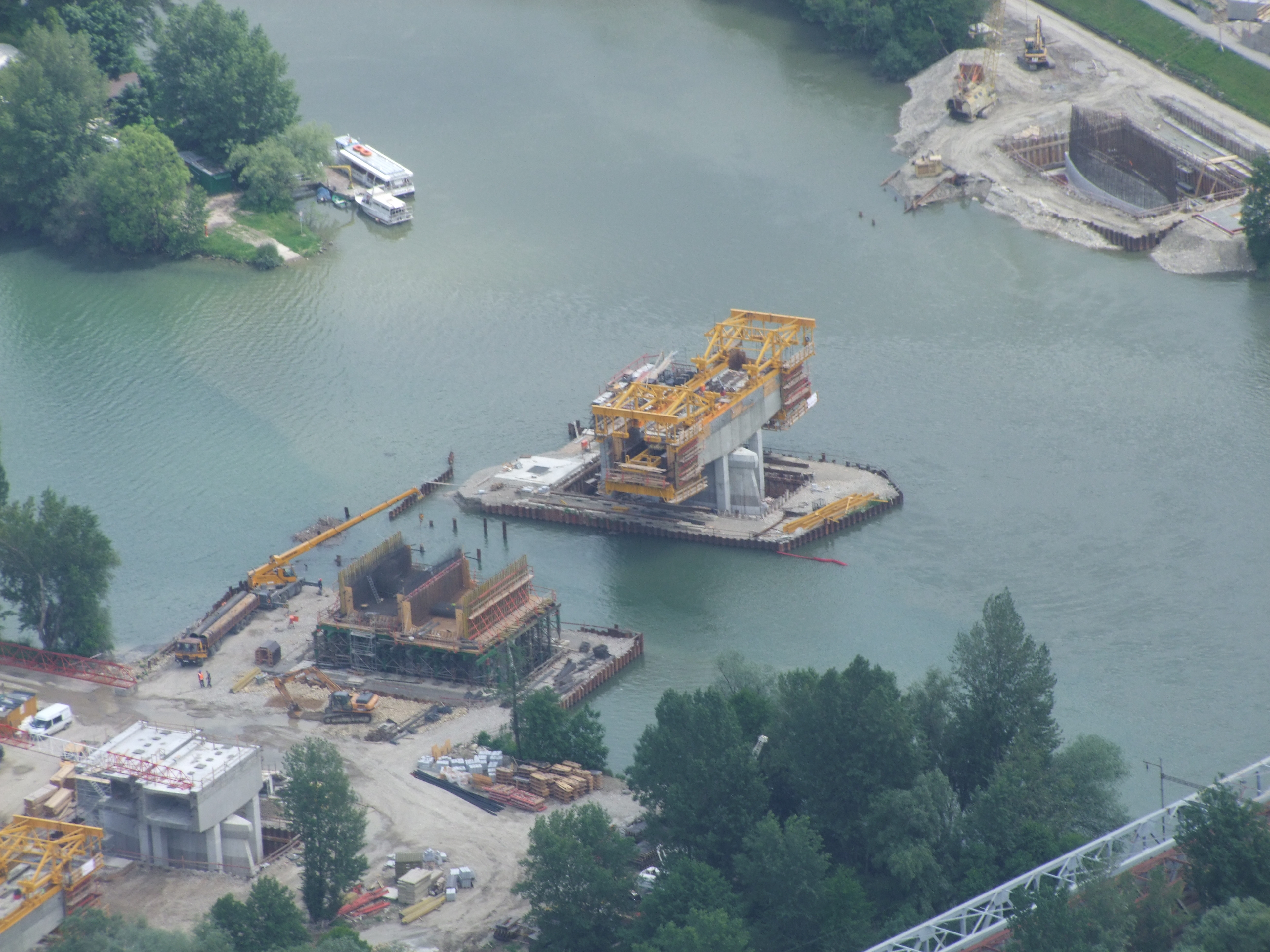 Trenčín, Slovakia